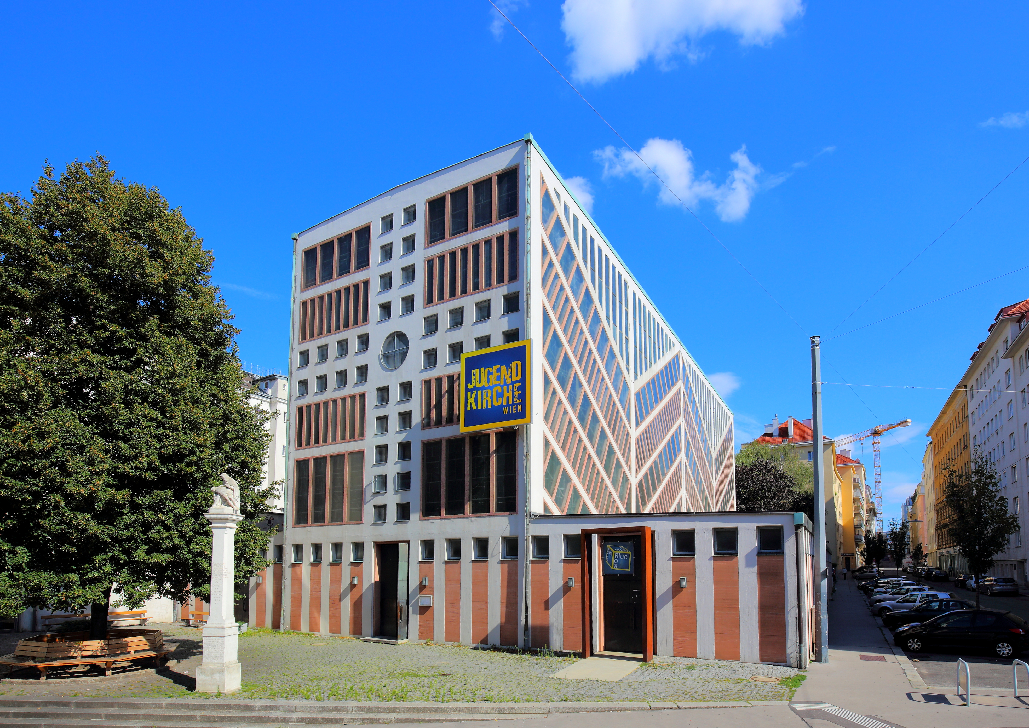 Die kath. Pfarrkirche St. Florian in Margareten (Wiedner Hauptstraße 99), ein Bezirk der österreichischen Bundeshauptstadt Wien. Der Stahlbetonbau wurde von den Architekten Rudolf Schwarz und Hans Petermair in den Jahren 1961 bis 1965 errichtet. Seit 2005 beherbergt die Kirche neben der Pfarre St. Florian auch die Jugendkirche Wien, ein Projekt der Katholischen Jugend der Erzdiözese Wien. Vor der Kirche befindet sich eine Pietà-Darstellung auf einem hohen, schlanken Pfeiler; laut Inschrift aus dem Jahr 1657.